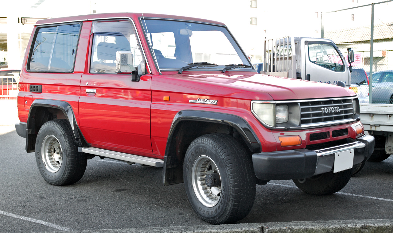 Toyota Land Cruiser 70 Prado 2 Door Hardtop 3.0DT SX Wide (KZJ71W)